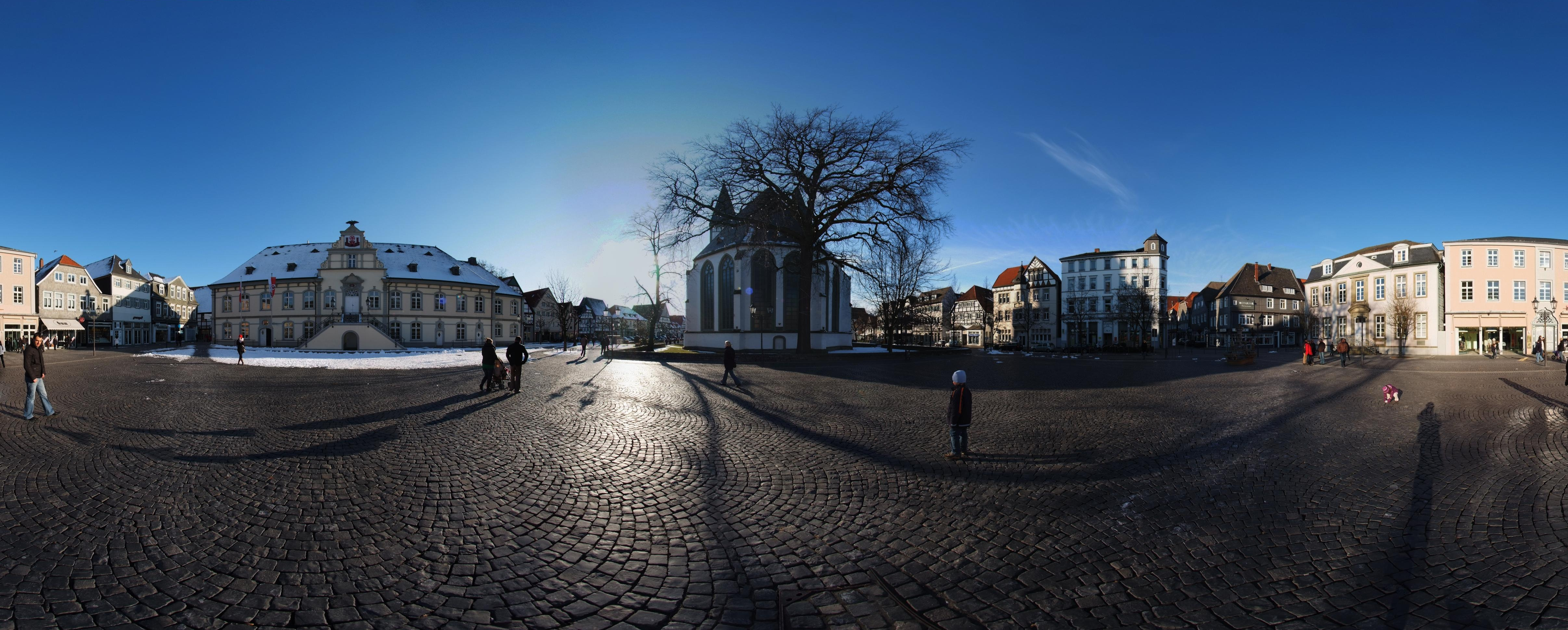 Panorama des Rathausplatzes in Lippstadt; mittig Naturdenkmal Eiche